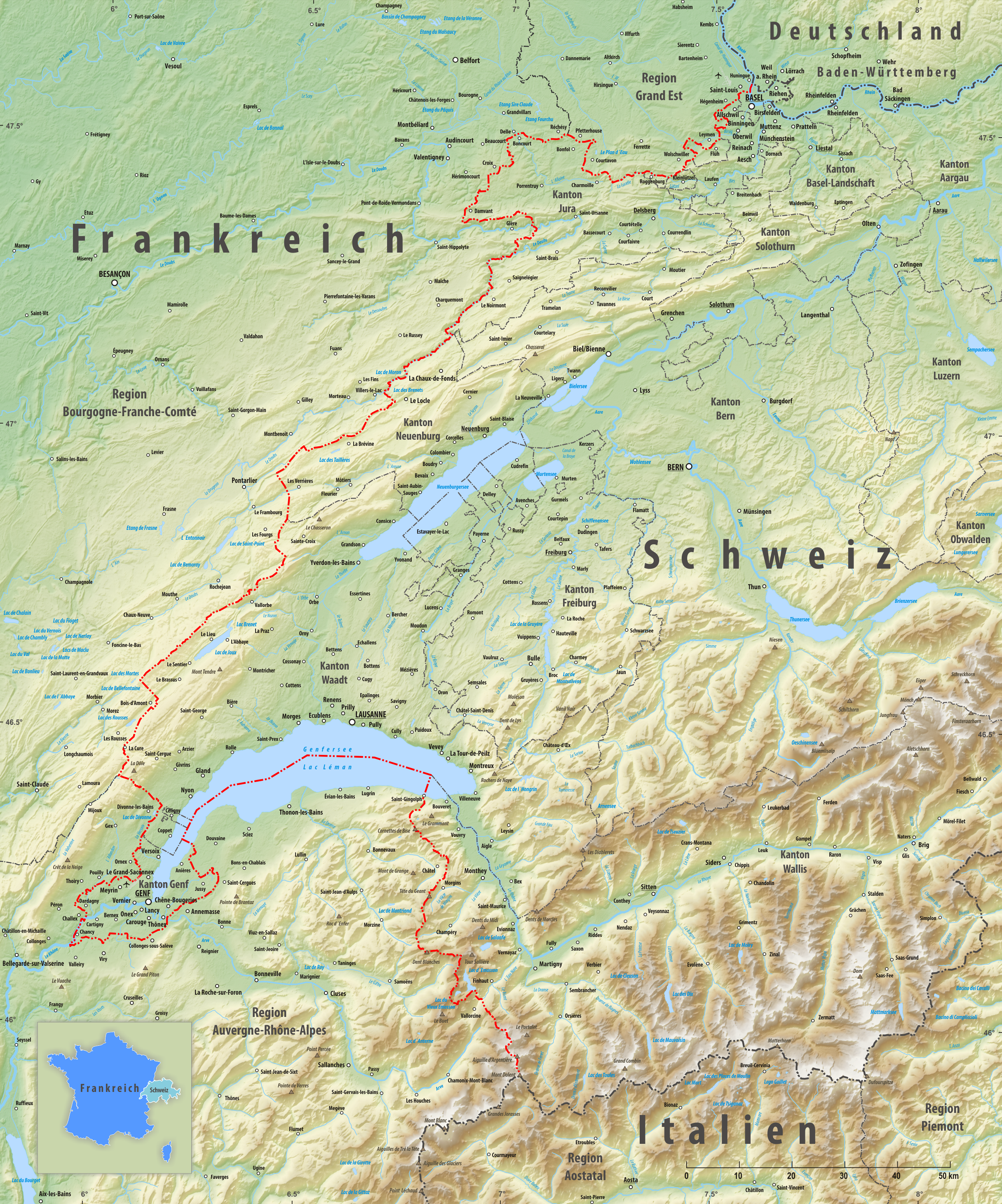 Reliefkarte des Grenzverlaufes zwischen der Schweiz und Frankreich Topographischer Hintergrund: NASA Shuttle Radar Topography Mission (public domain). SRTM3 v.2.